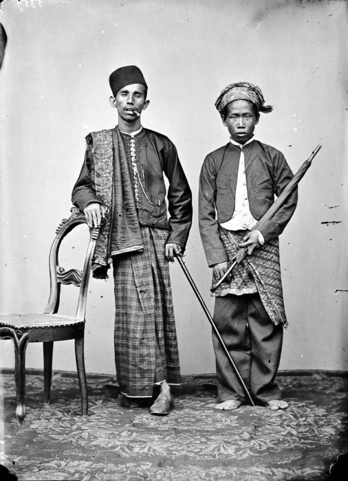 Negatief. Portret van het hoofd van de Arabieren te Tegal, Java